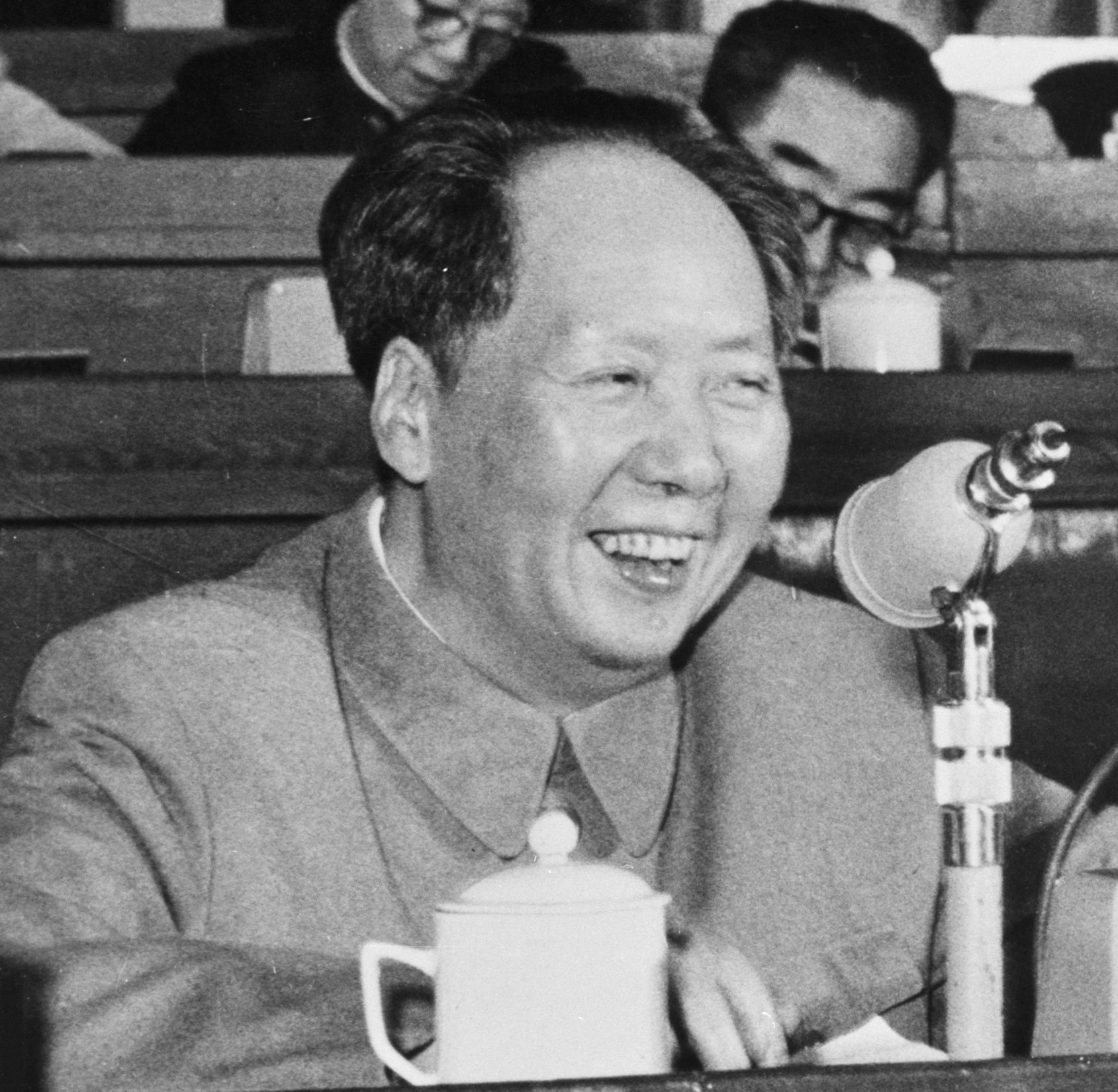 Mao Zedong